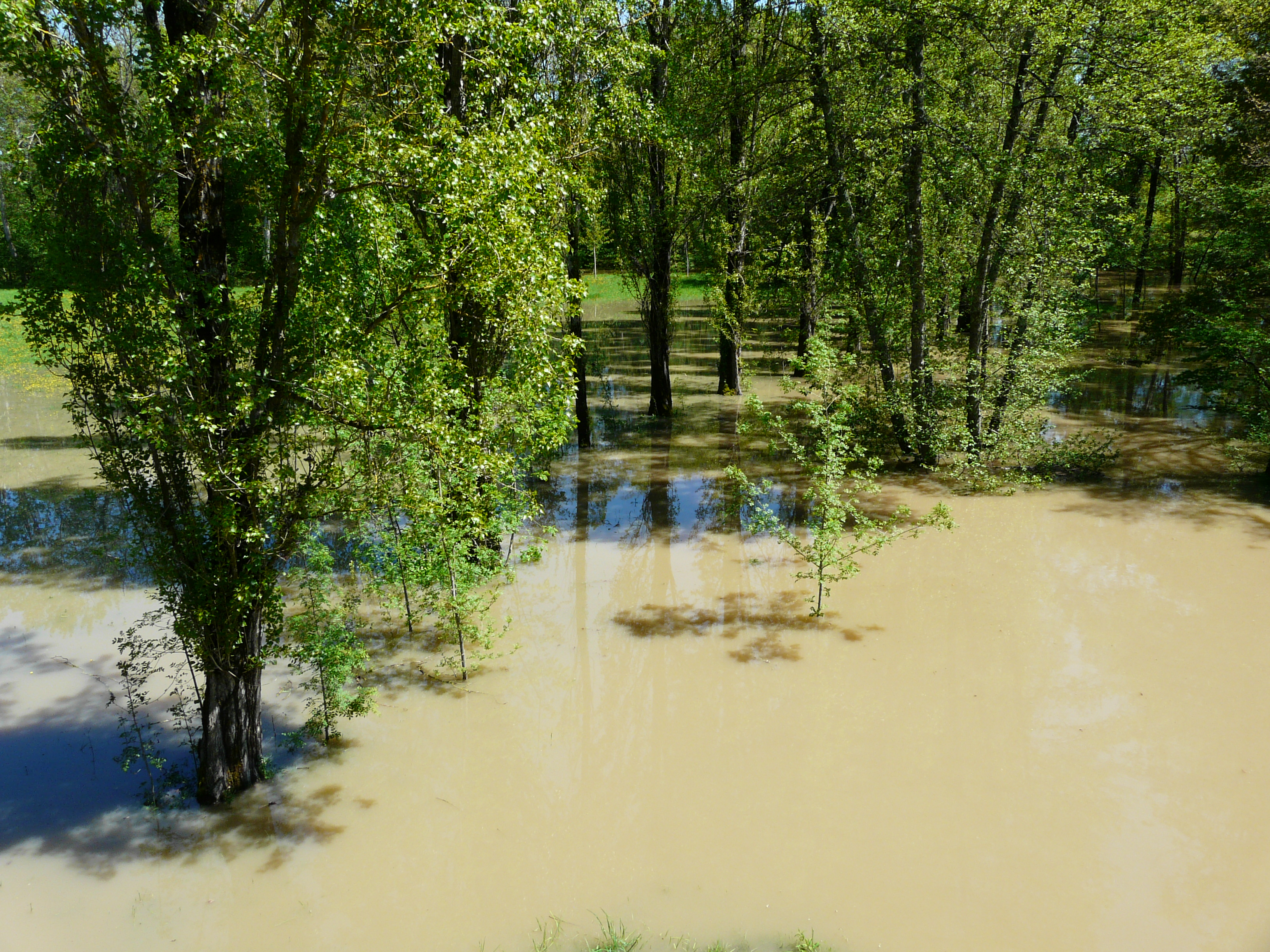 Le Barailler en crue en amont du pont de la route départementale 32, entre Le Fleix (à gauche) et Saint-Pierre-d'Eyraud (à droite), Dordogne, France.